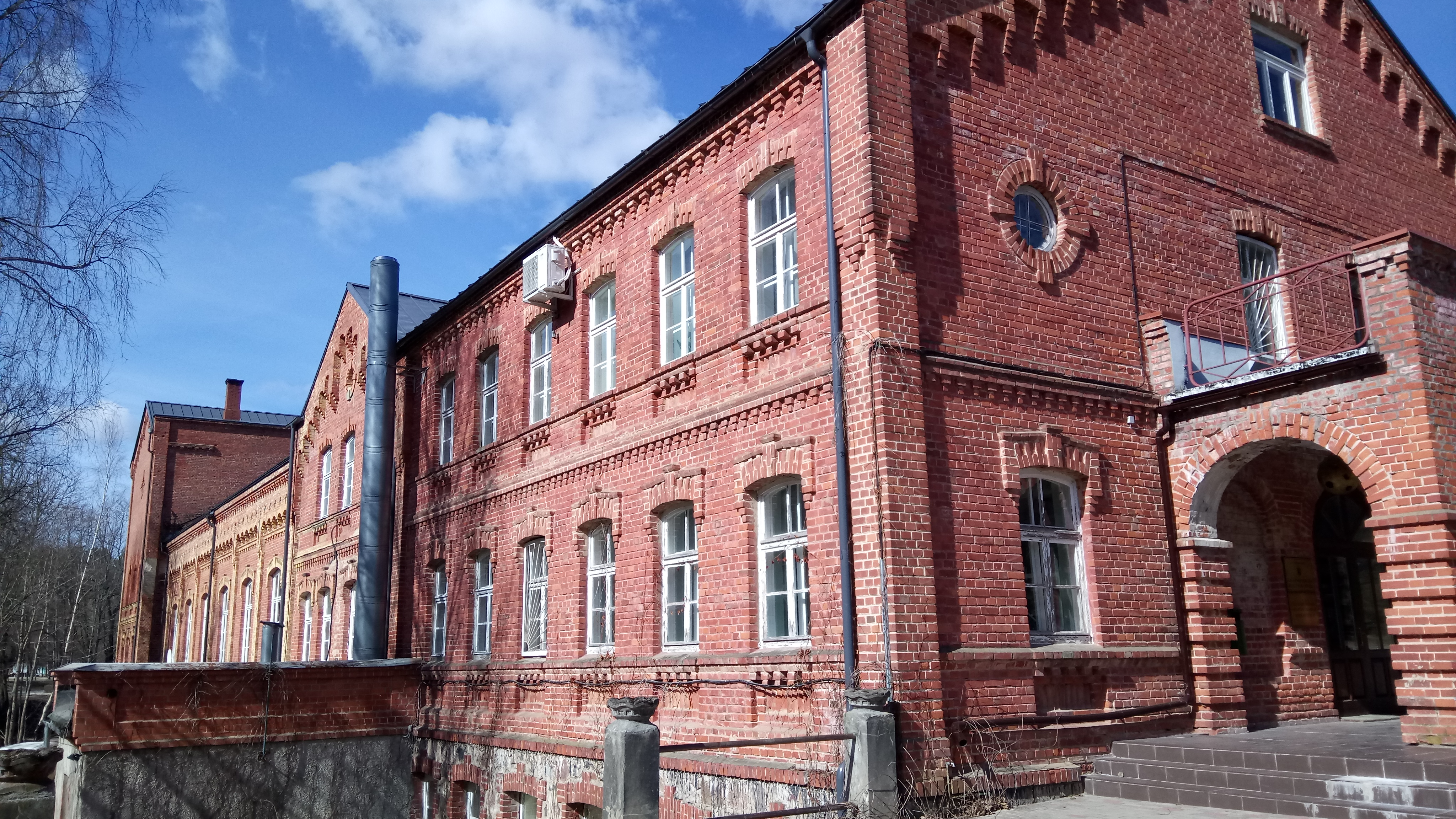 Kultūras nama ēka mūsdienās